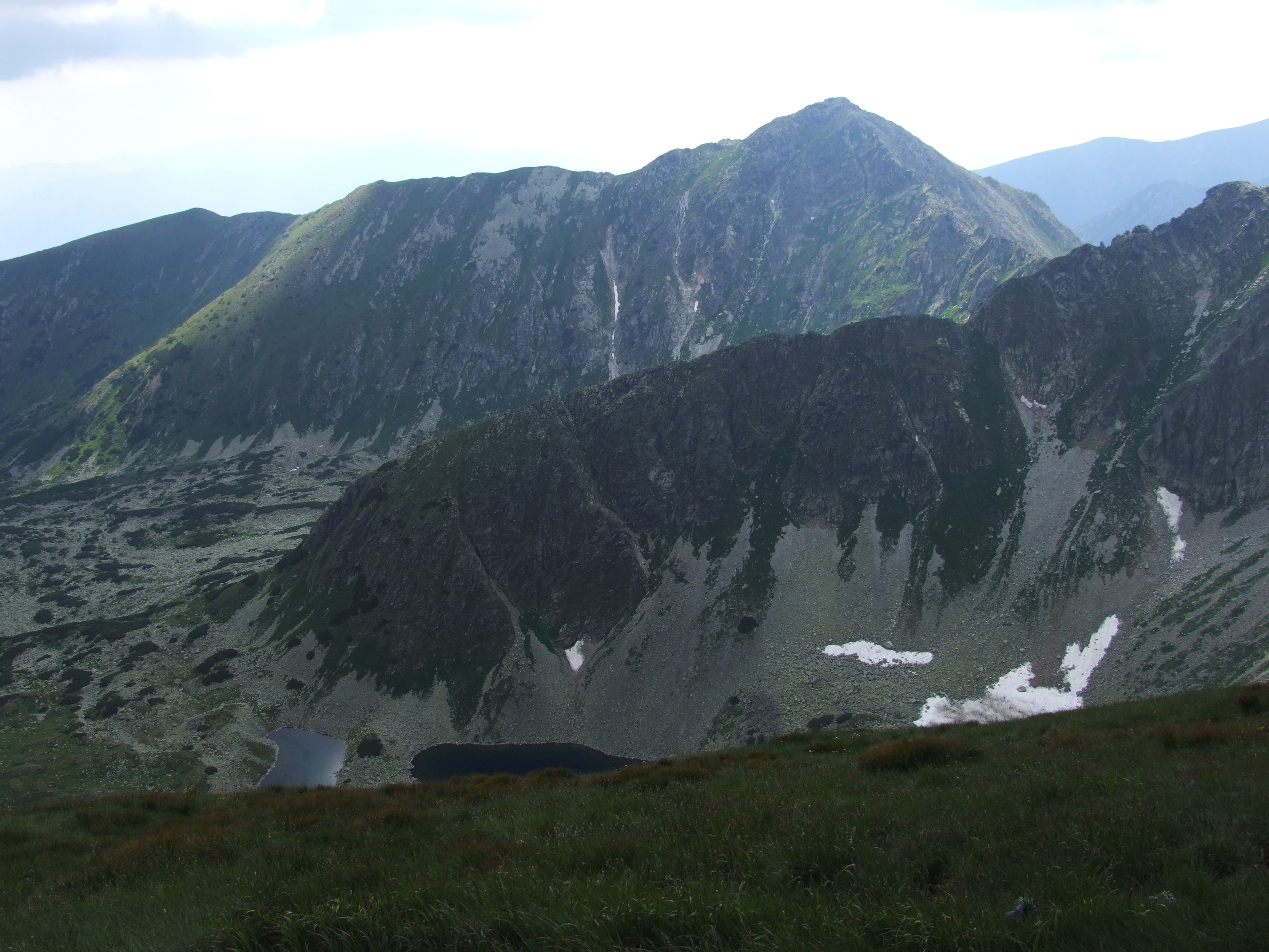 Dolina Bystrej (Tatry Zachodnie), widok z południowo-wschodniej grani Bystrej (Kobyły). U góry: południowo-zachodnia grań Bystrej ze szczytami (od lewej): Jeżowa Kopa, Skrajna Kopa, Zadnia Kopa. Na środku Garbate (nad Bystrymi Stawami).